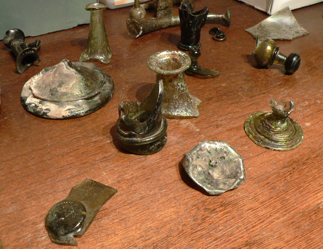 Fragmente von ausgegrabenen Glasgefäßen der Waldglashütte am Lakenborn